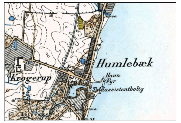 Humlebæk1898